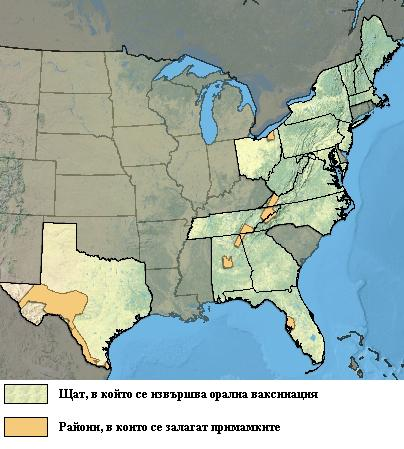 Щати и райони в САЩ, където се извършва орална ваксинация против бяс